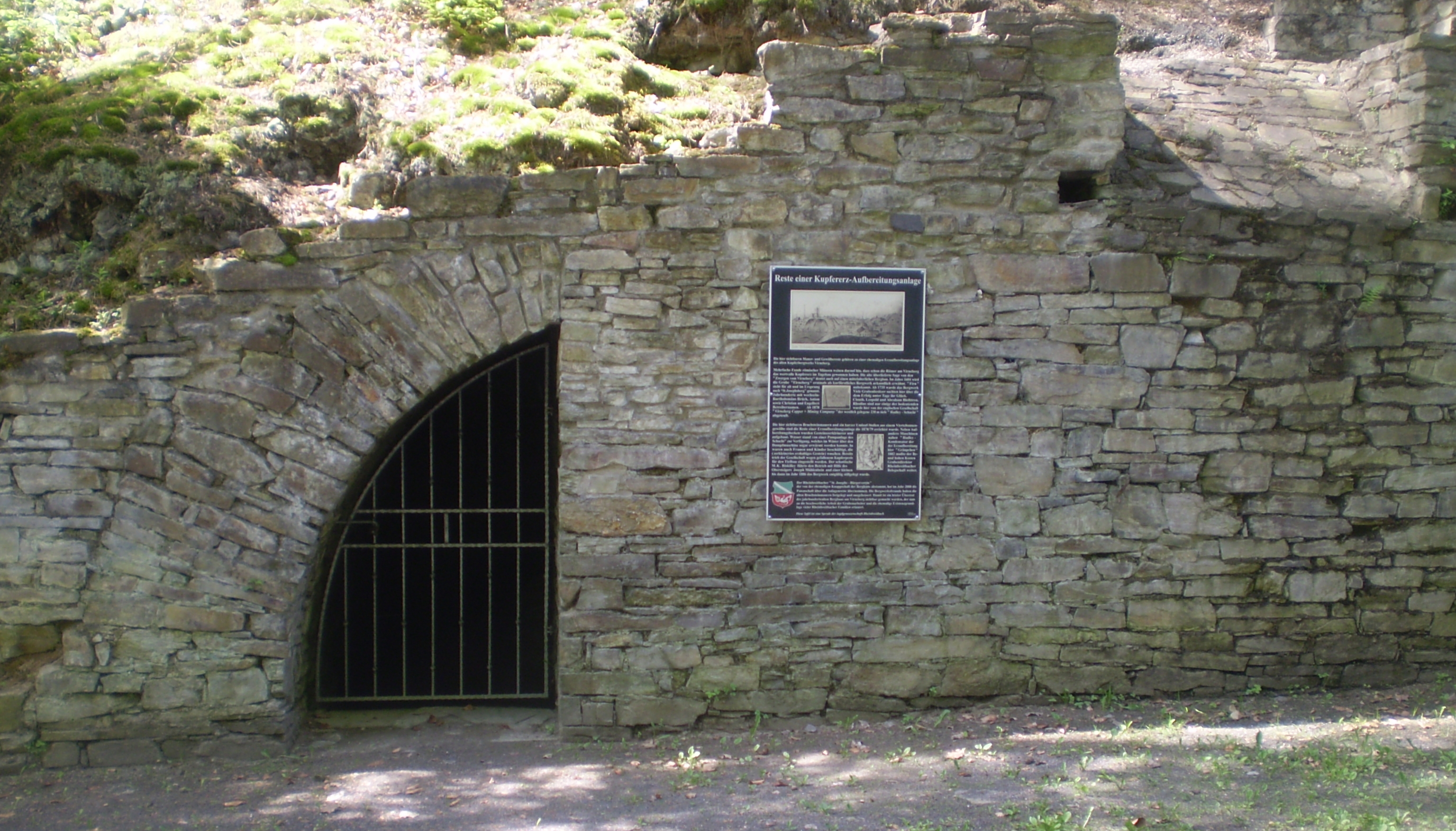 Mauer- und Gewölbereste einer Kupfererz-Aufbereitungsanlage des Bergwerks Virneberg, Westerwaldstraße, Rheinbreitbach